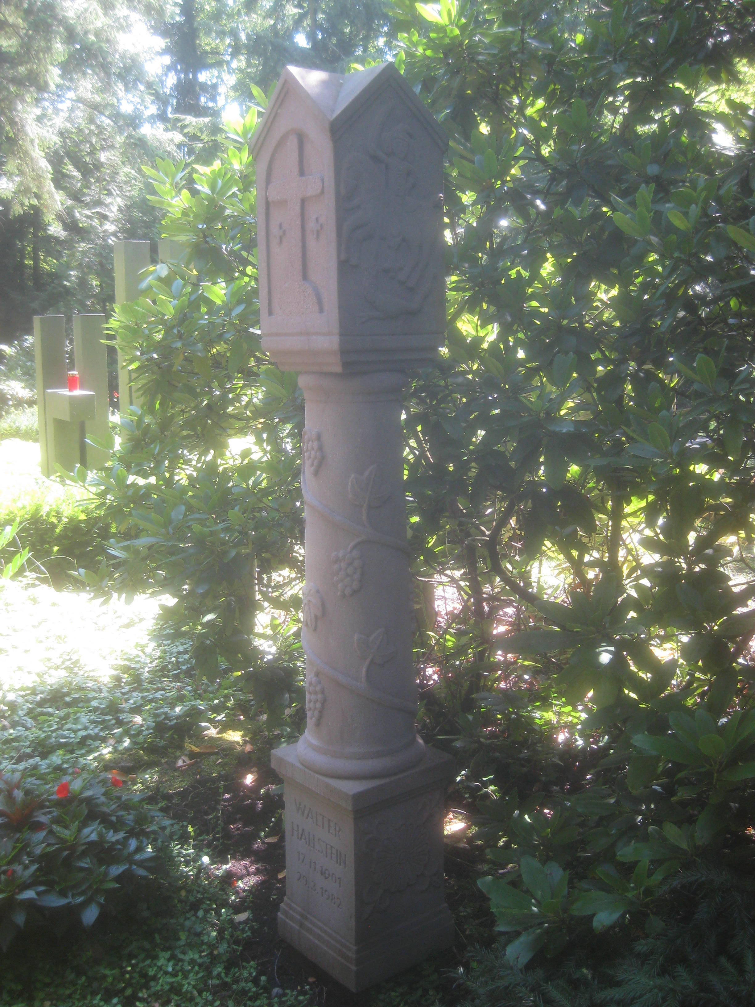 Grab von Walter Hallstein, Stuttgart, Waldfriedhof Stuttgart, Abteilung 20 b.